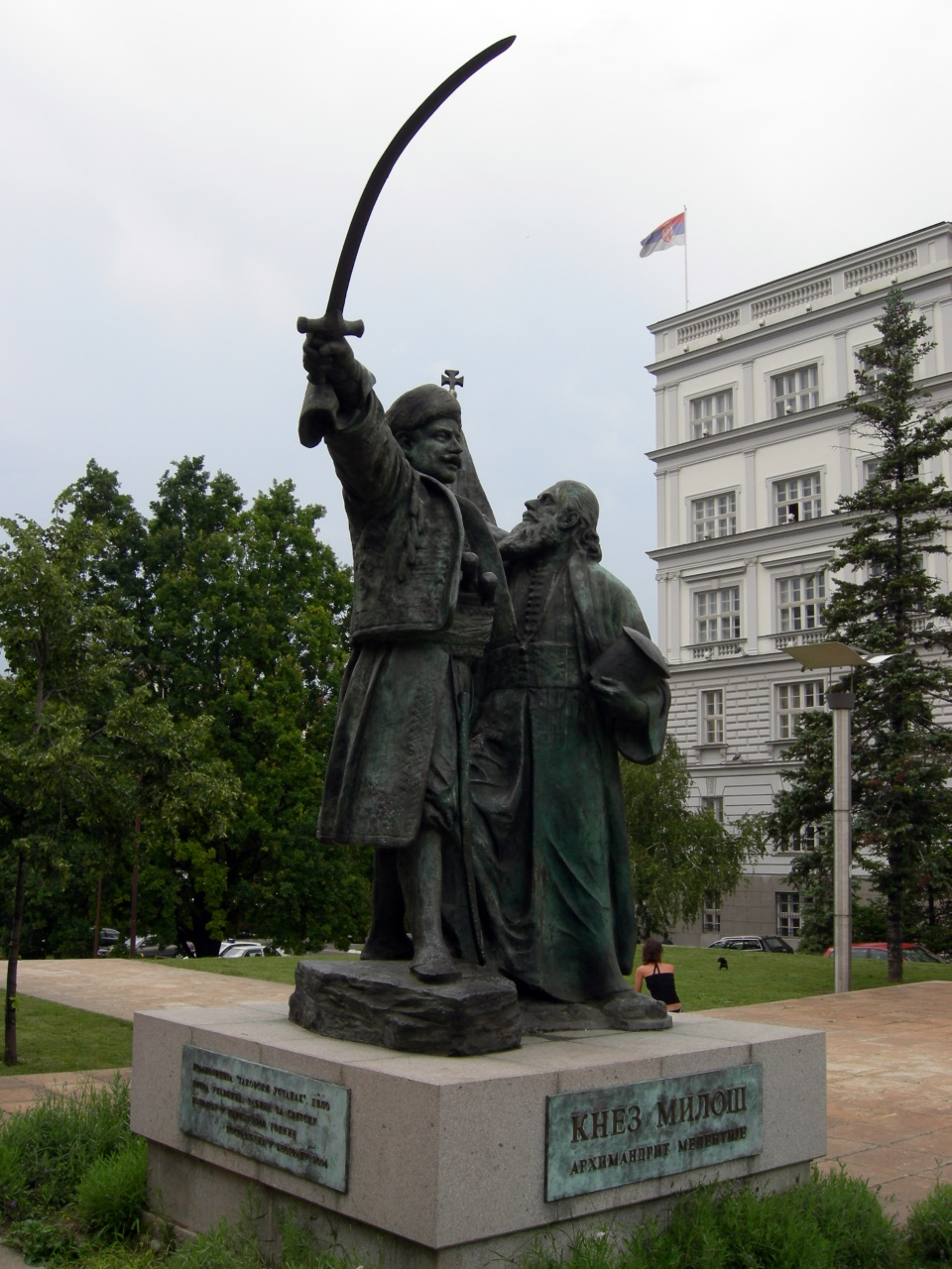 Композиција "Таковски устанак", дело Петра Убавкића. Рађена за светску изложбу у Паризу 1900. године. Постављена у Београду 2004. године. На композицији су приказани кнез Милош и архимандрит Мелентије.